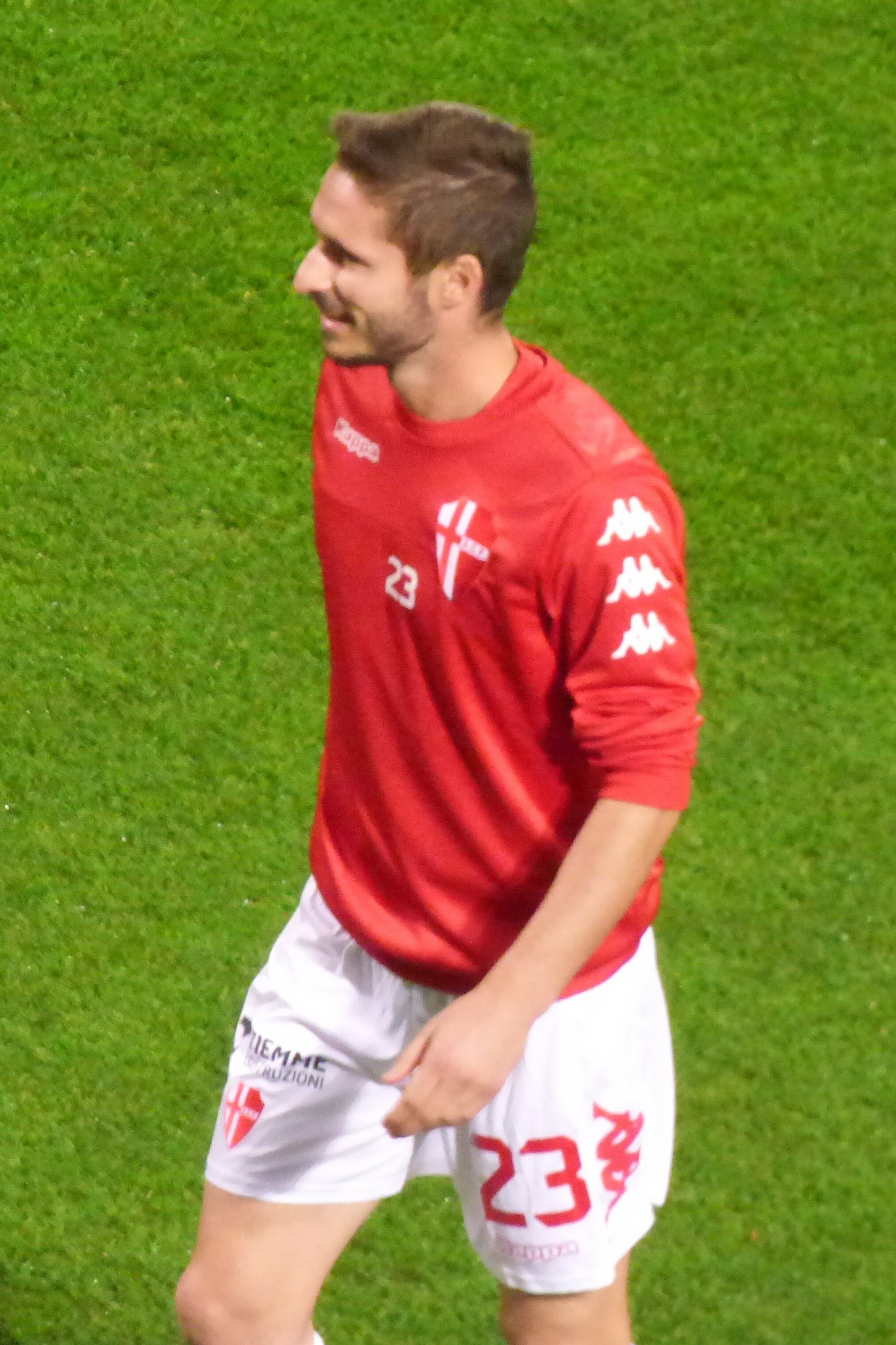 Daniel Cappelletti lors du match amical RC Lens - Calcio Padova, le 11 octobre 2018 au Stade Bollaert-Delelis de Lens.